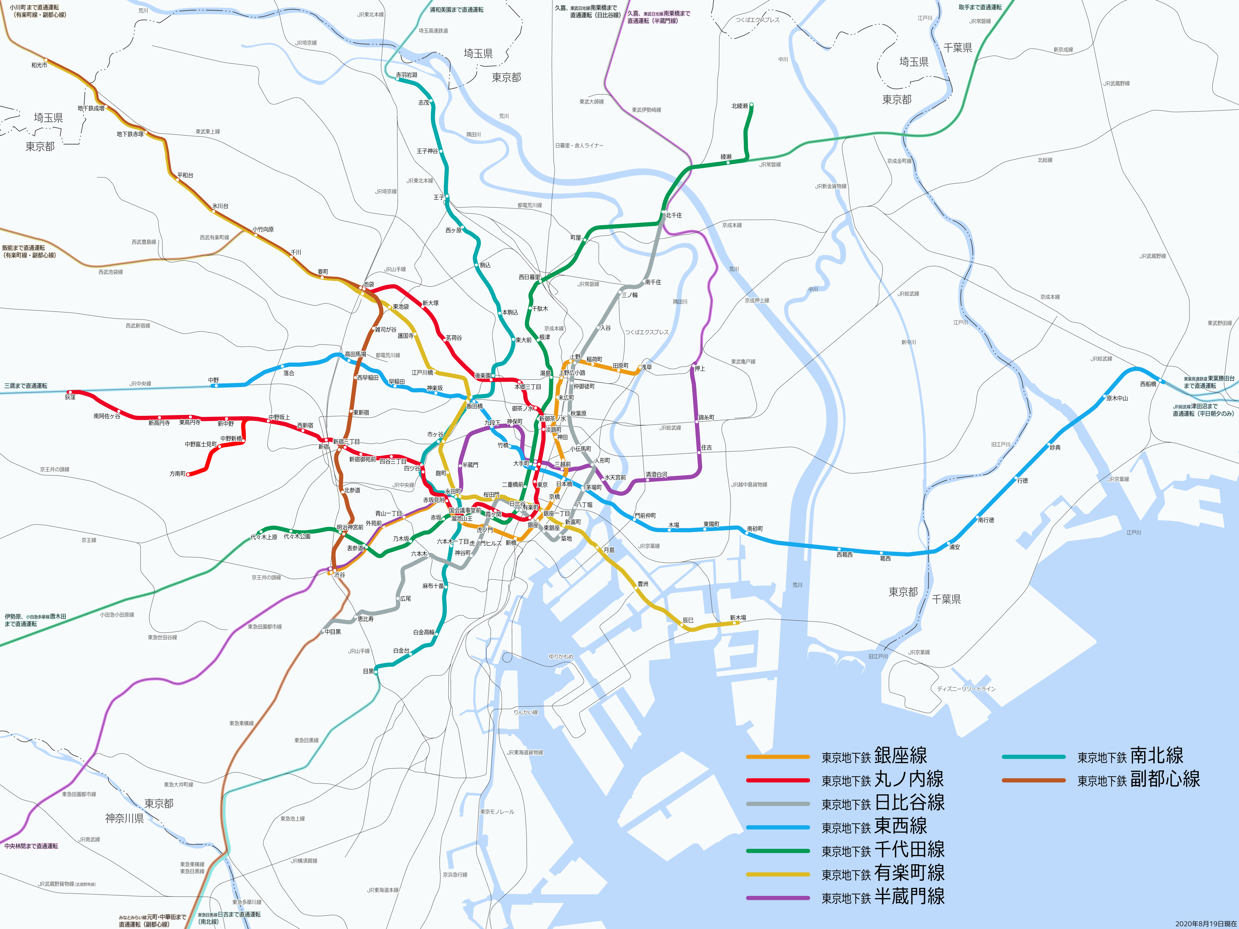 東京地下鉄（東京メトロ）の路線図（2020年8月19日現在）